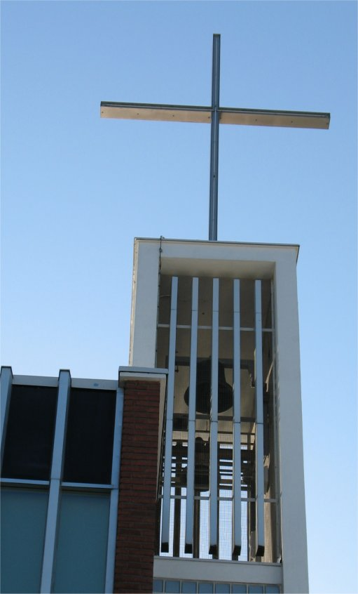 Pitajanmaki church tower, situated in the Pitäjänmäki district of Helsinki, Finland. (In Finnish: Pitäjänmäen kirkon tornia Helsingin Pitäjänmäessä)